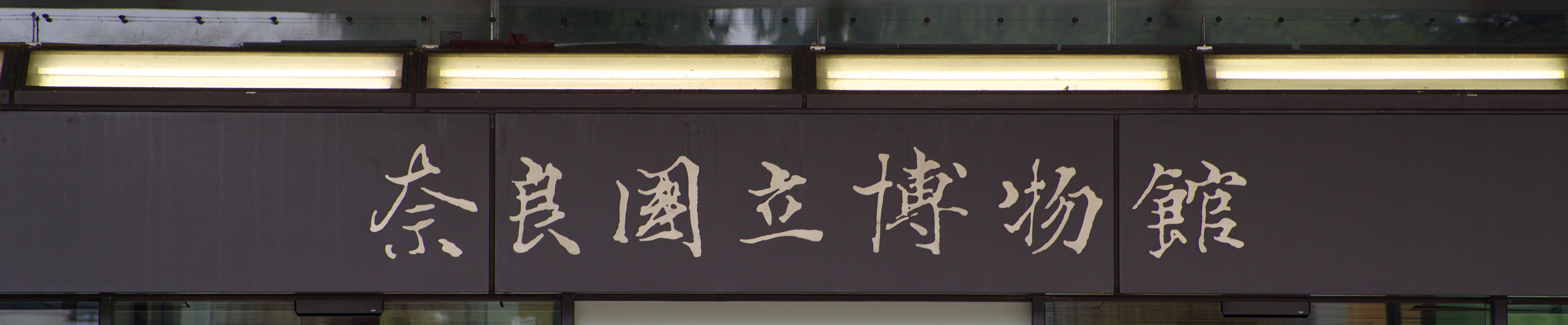 奈良国立博物館新館題字。聖武天皇筆「雑集」から集字。